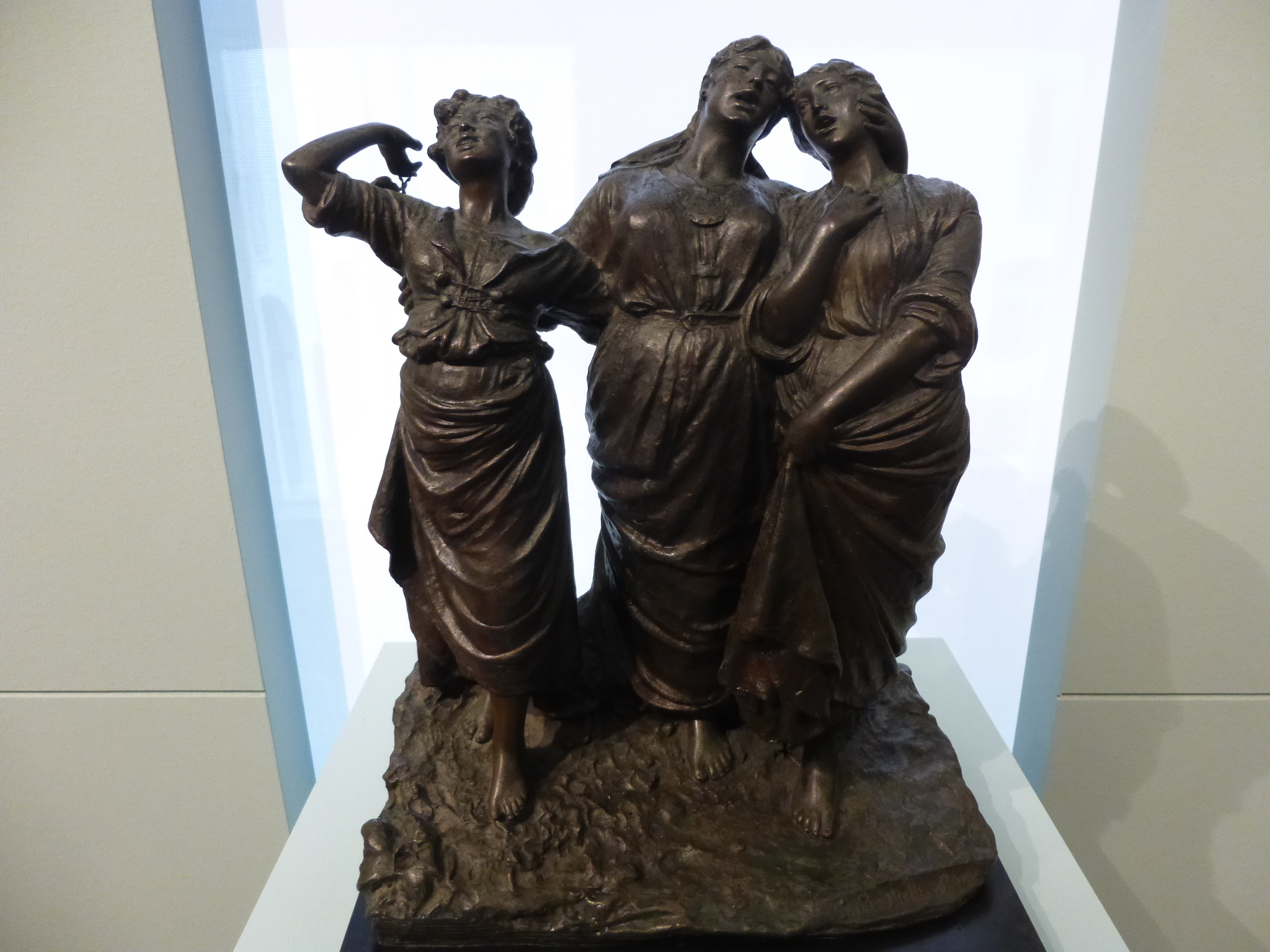 Roma, Galleria comunale d'arte moderna. Costantino Barbella, Canto d'amore - bronzo, 1877 circa